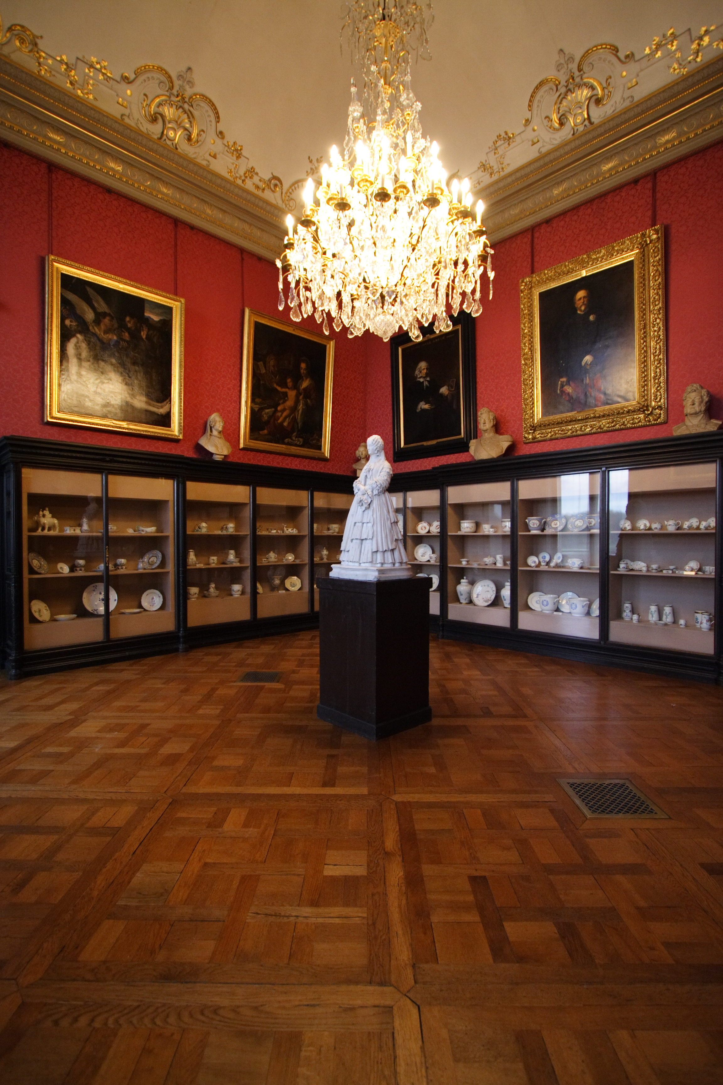 Musée Condé, salon d'Orléans (salle des porcelaines) (Chantilly, France)